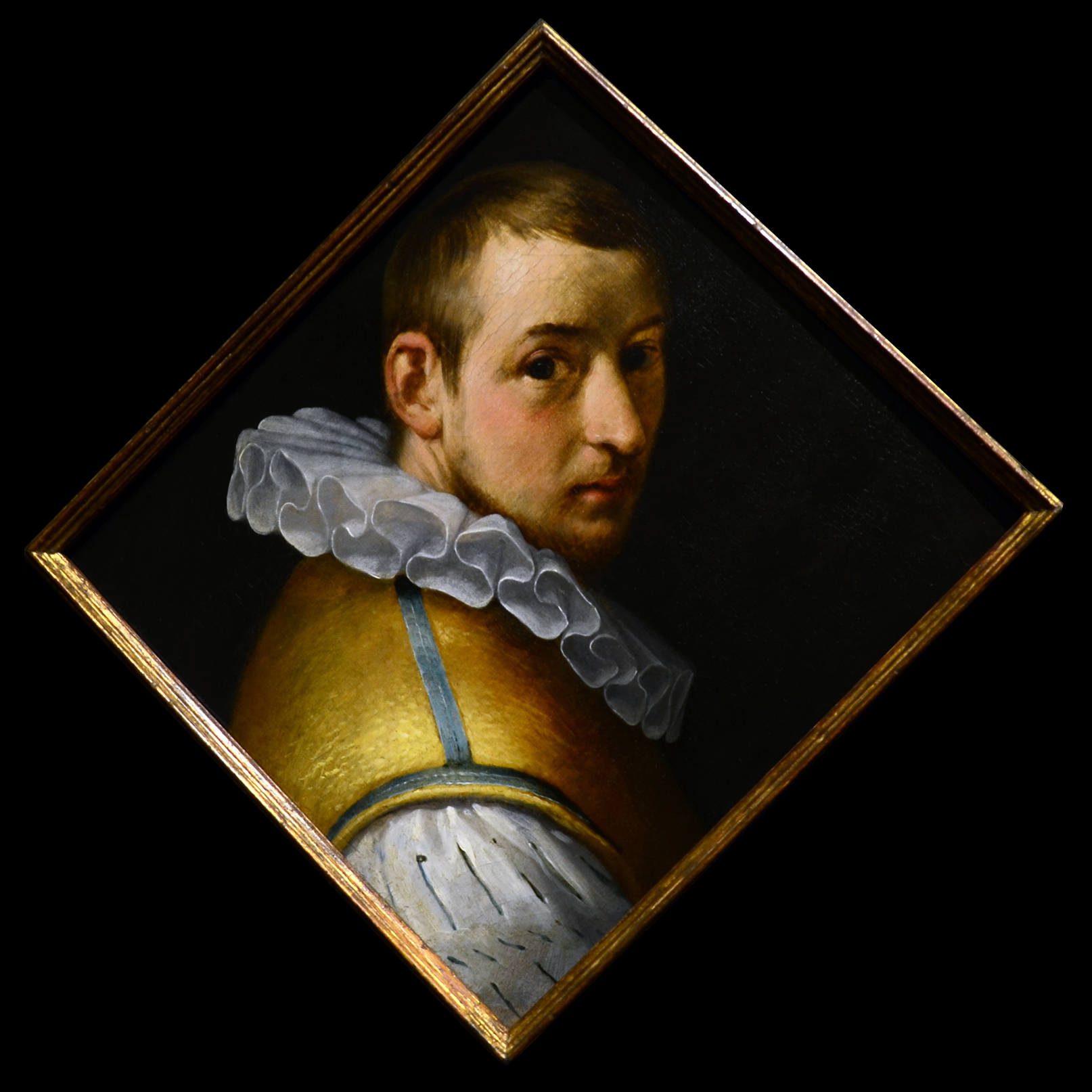 Self-portrait